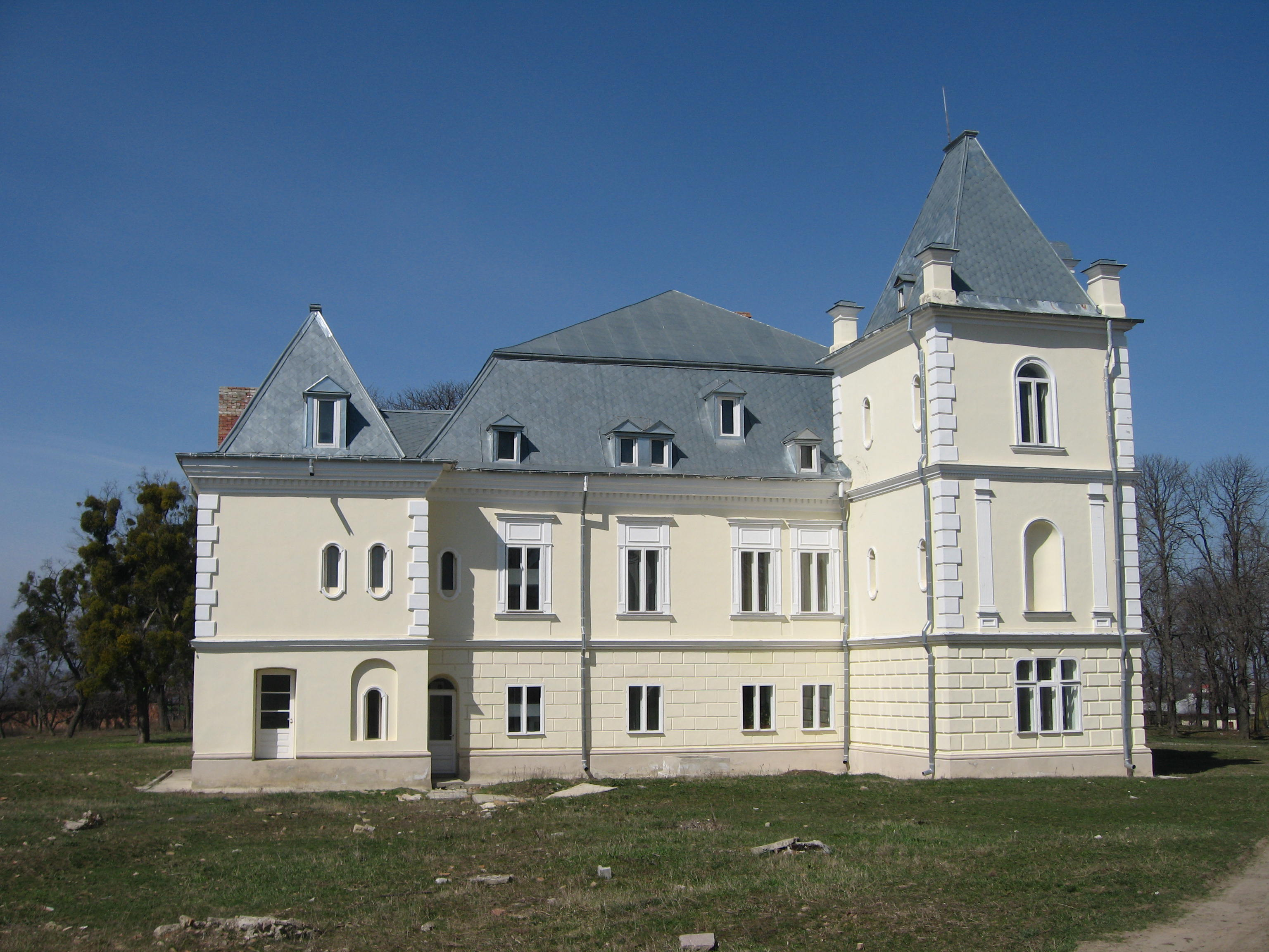 Conacul Sturdza Cantacuzino-Pașcanu din Popești, jud. Iași, România